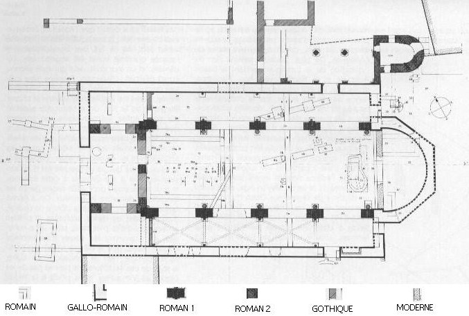 plan du relevé des fouilles de Saint_pierre_aux_nonnains